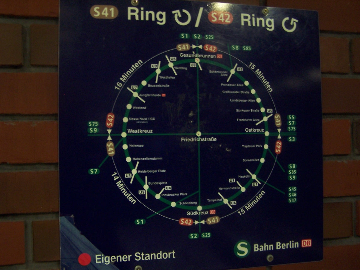 Schéma du Ringbahn de Berlin